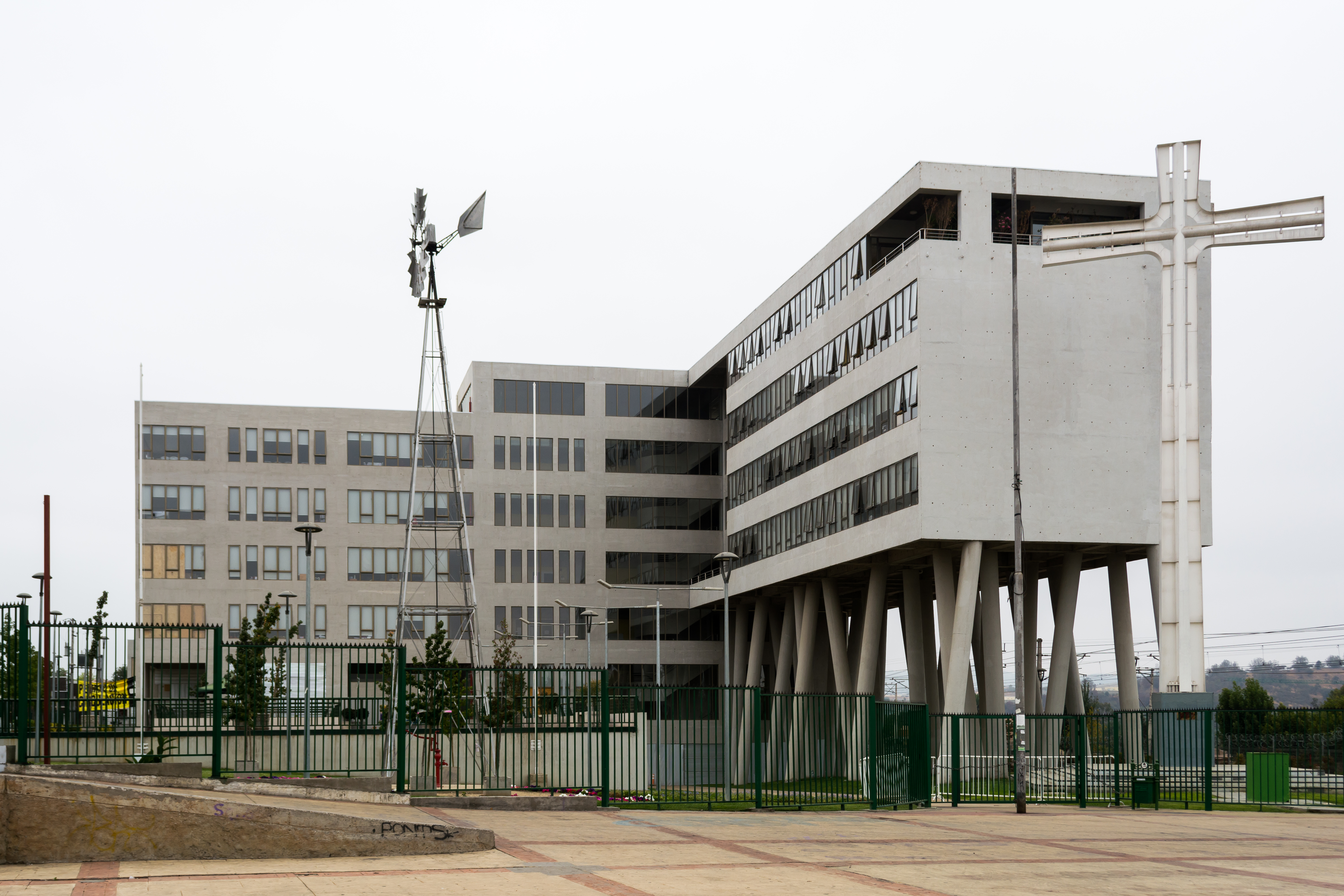 Edificio Consistorial, Villa Alemana, Región de Valparaíso, Chile